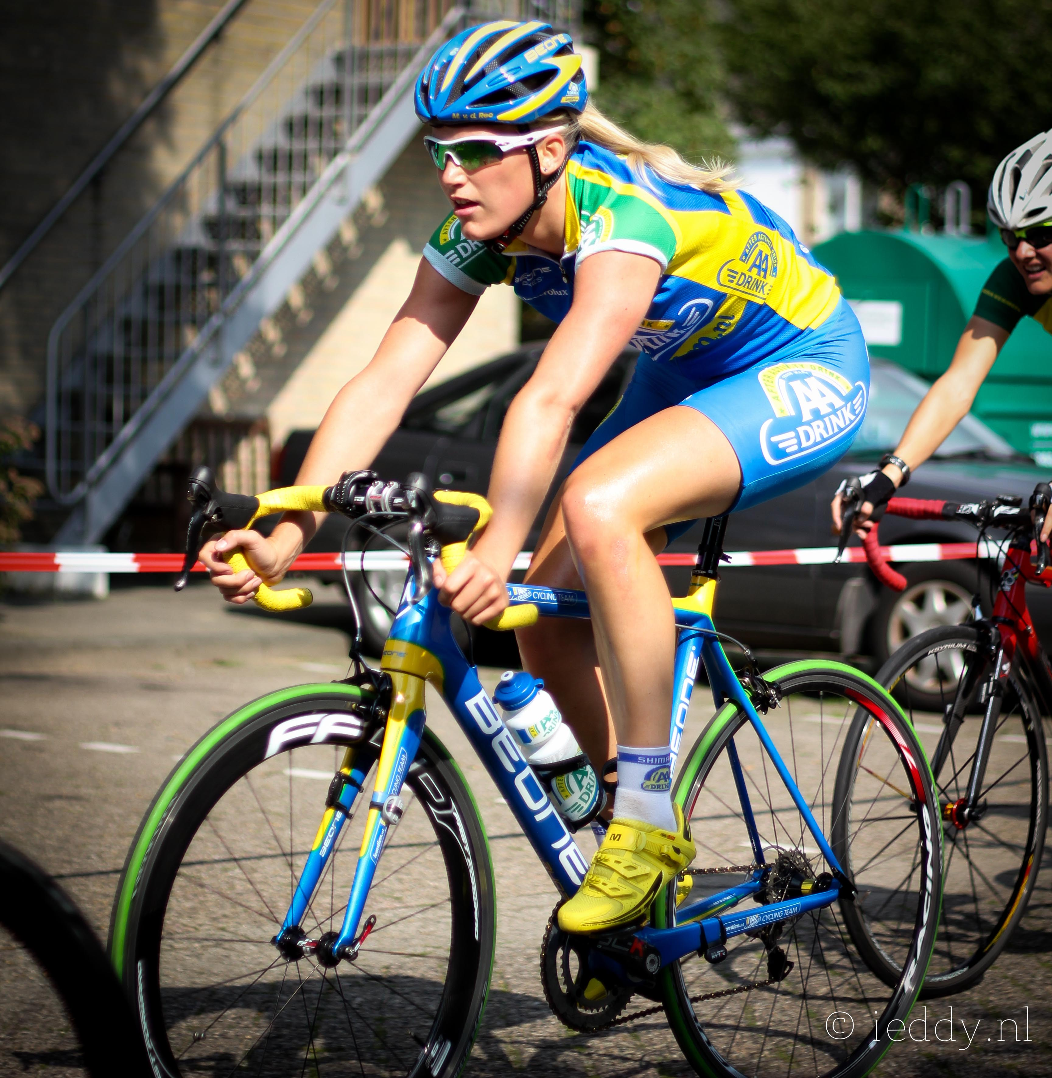 AA Cycling team Draai van de Kaai 2011